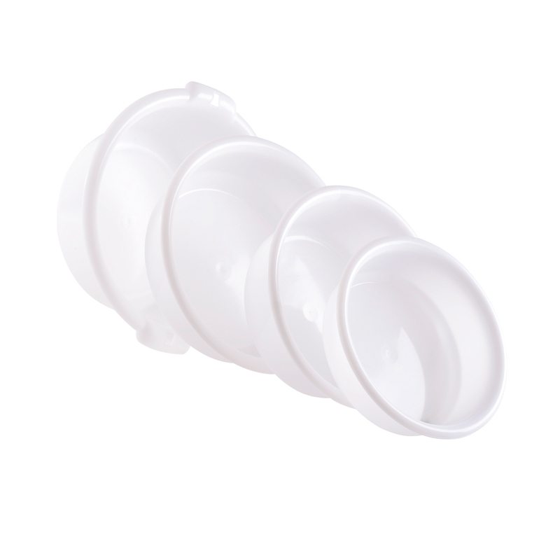 Gamme de cuvettes historiques GILAC